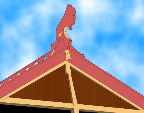 Epi de faîtage zoomorphe, Hotel Holmenkollen, Oslo.